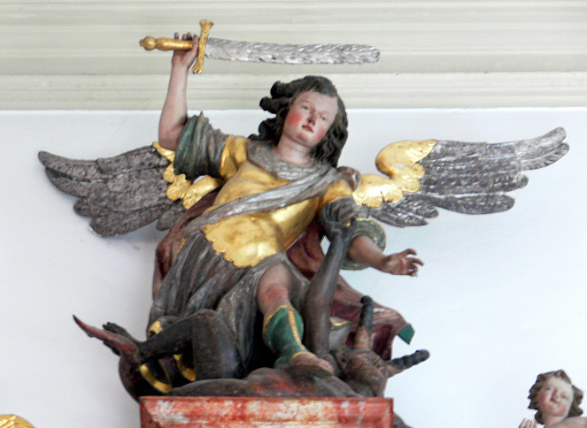 Pfarr- und Wallfahrtskirche St. Philippus und Jakobus, Bergatreute Rechter Seitenaltar: Bekrönung durch eine Figur des Erzengels Michael, von Johann Jakob Brombacher (aus Altdorf-Weingarten)